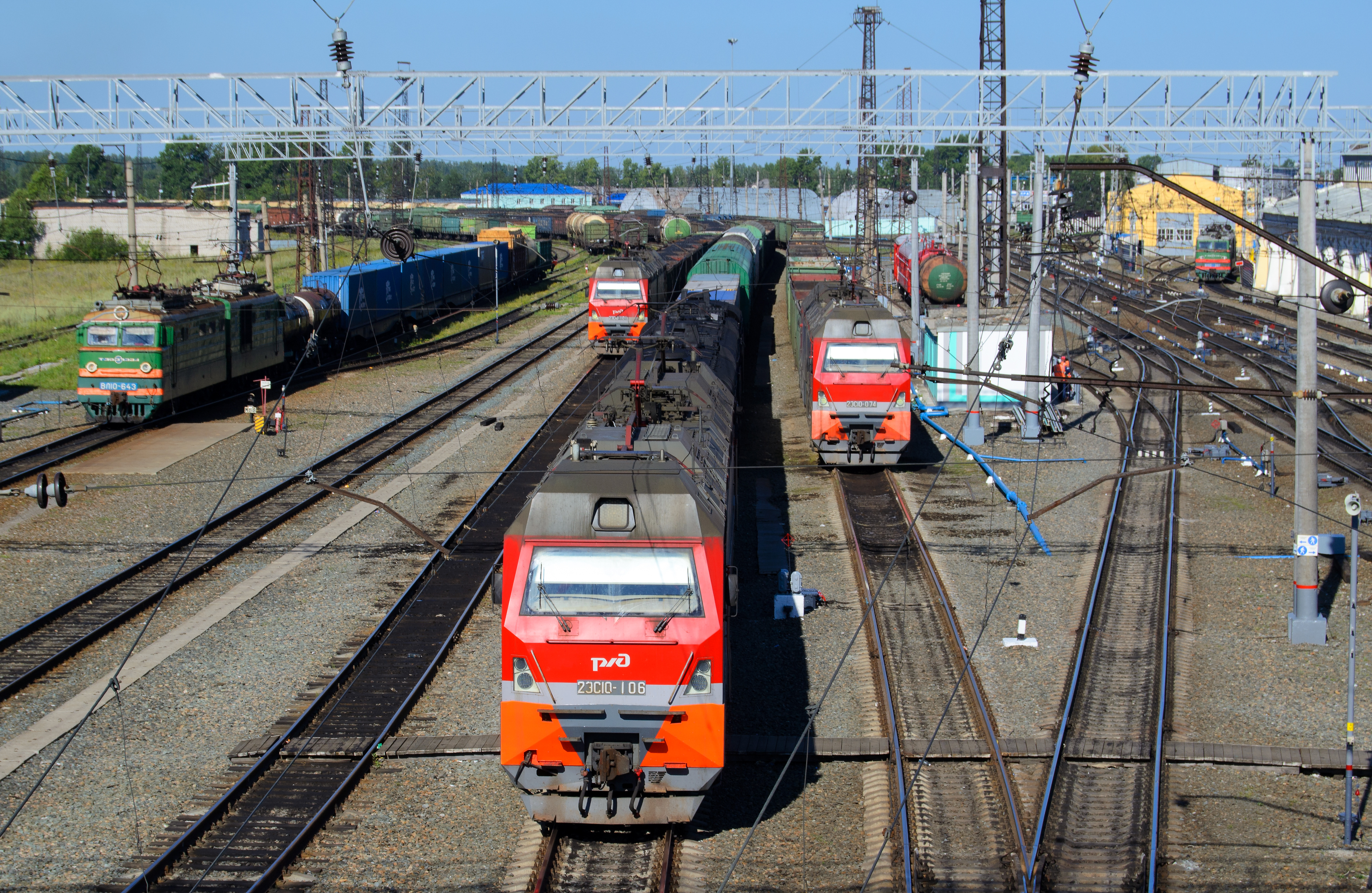 Грузовые поезда в западной горловине станции Тайга. Слева ВЛ10-643 проводит сортировочные работы, остальные поезда ожидают отправления.